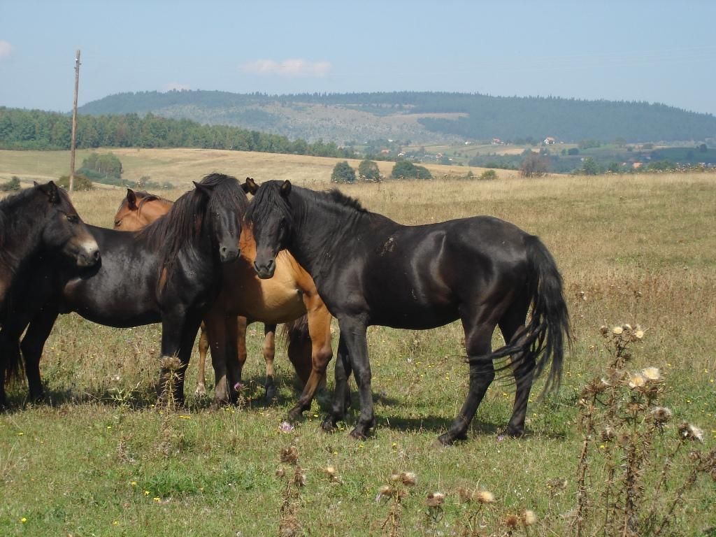 Staatsgestüt Borike